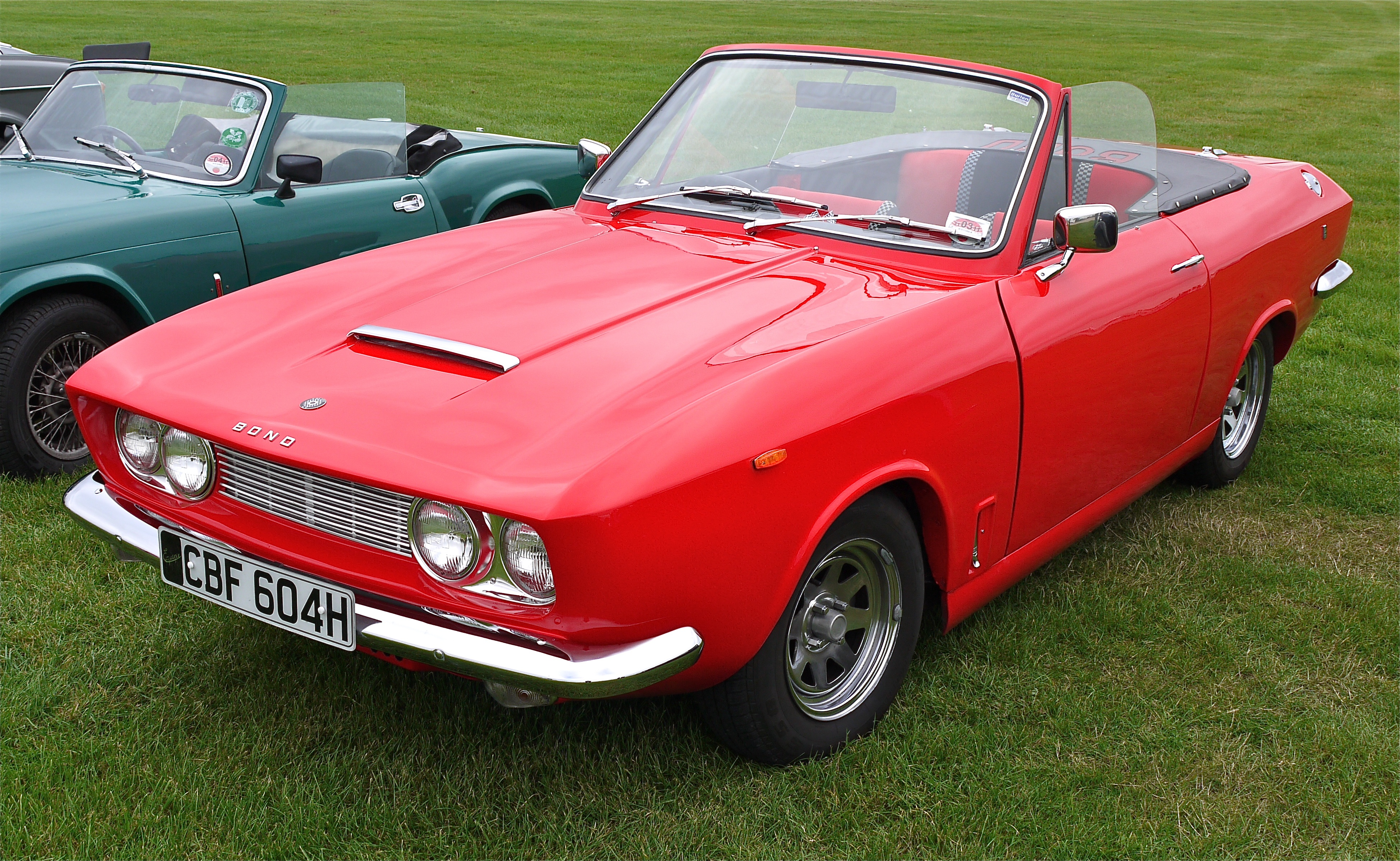 Panasonic G1 14-45 Lens